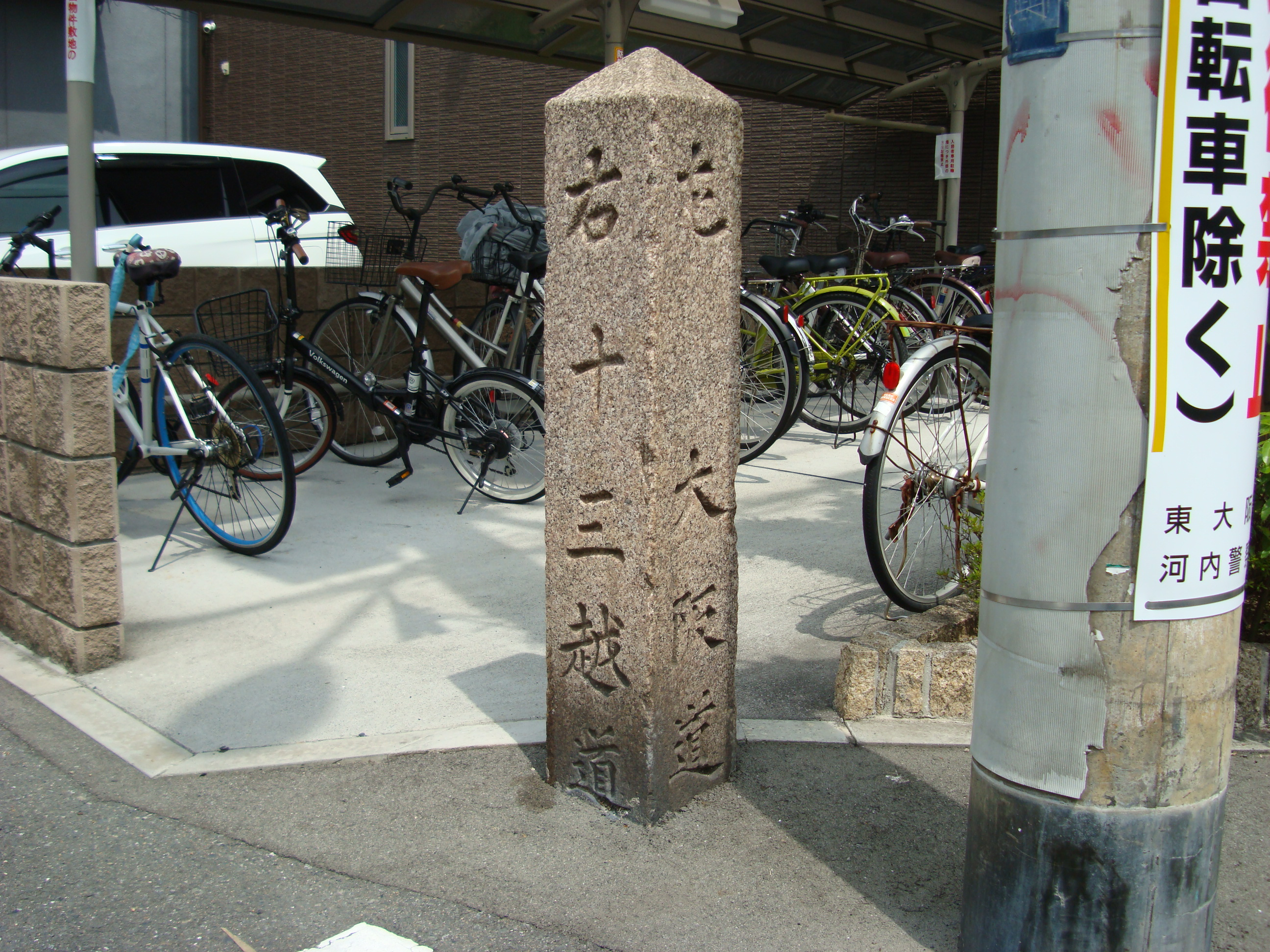 東大阪市若江南町十三街道と河内街道の交差点